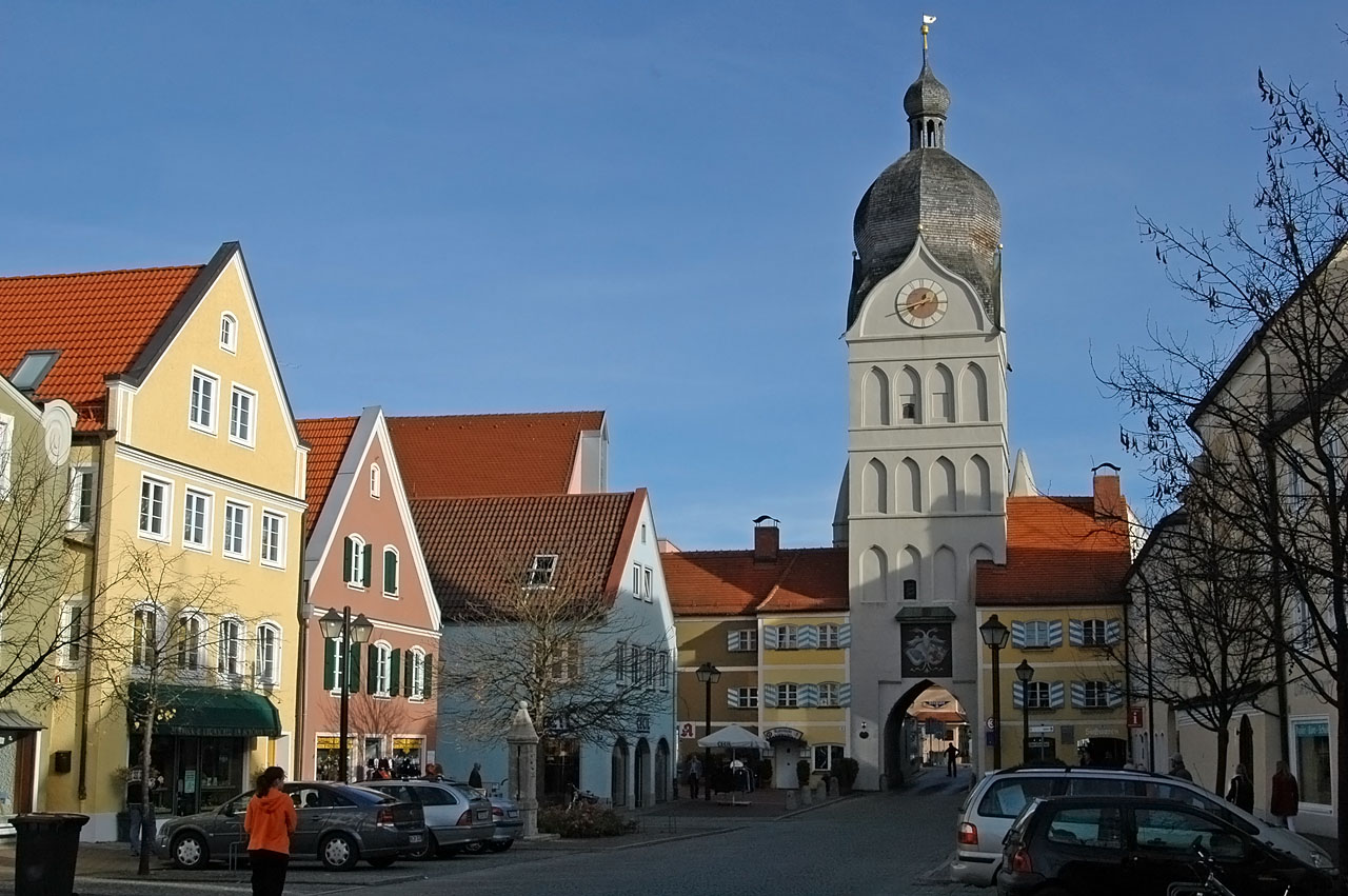 Der "Schöne Turm", eines der Wahrzeichen Erdings.